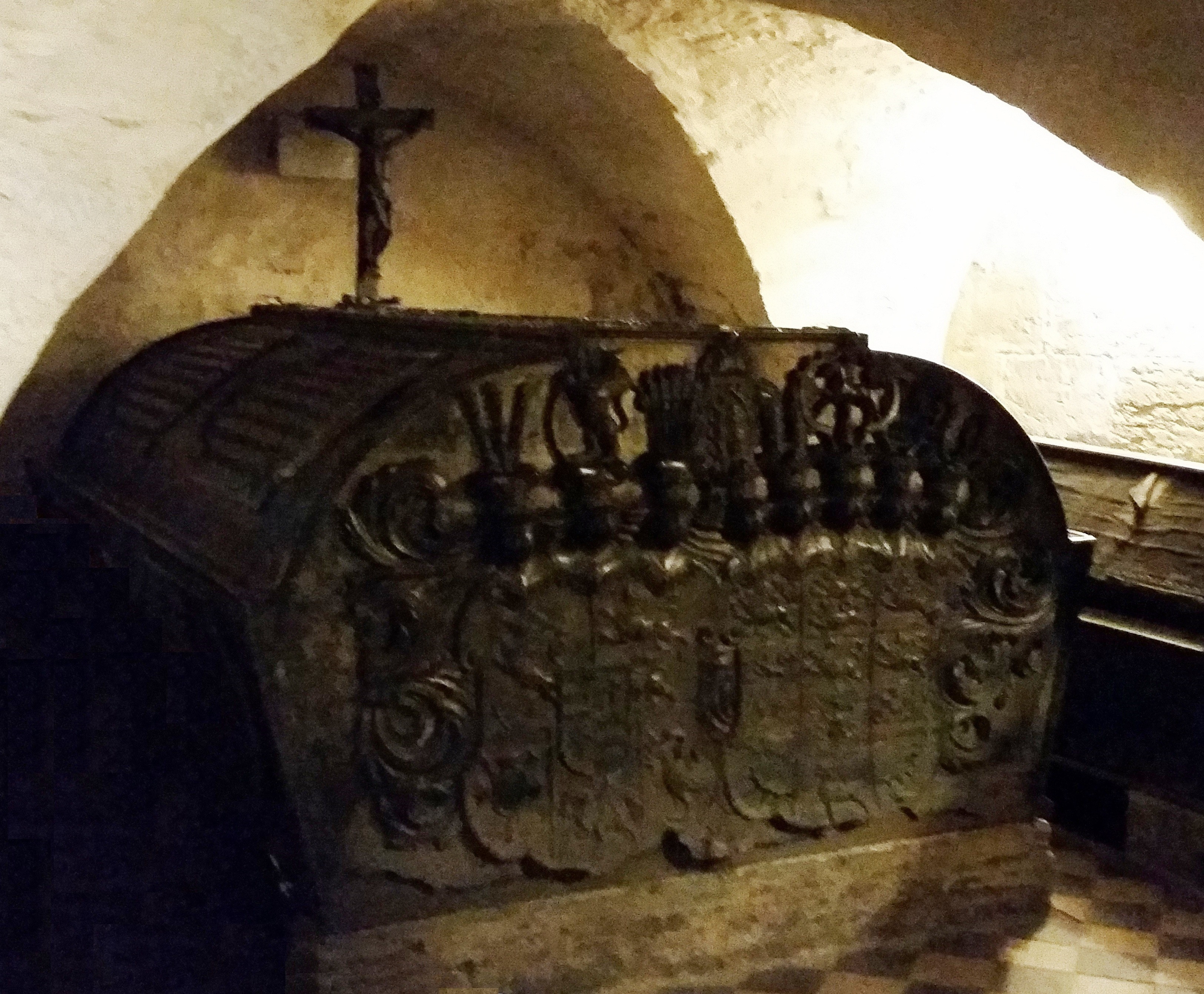 Wolfenbüttel, Hauptkirche Beatae Mariae Virginis, Welfengruft, Doppelsarkophag Herzog Anton Ulrich und Herzogin Elisabeth Juliane